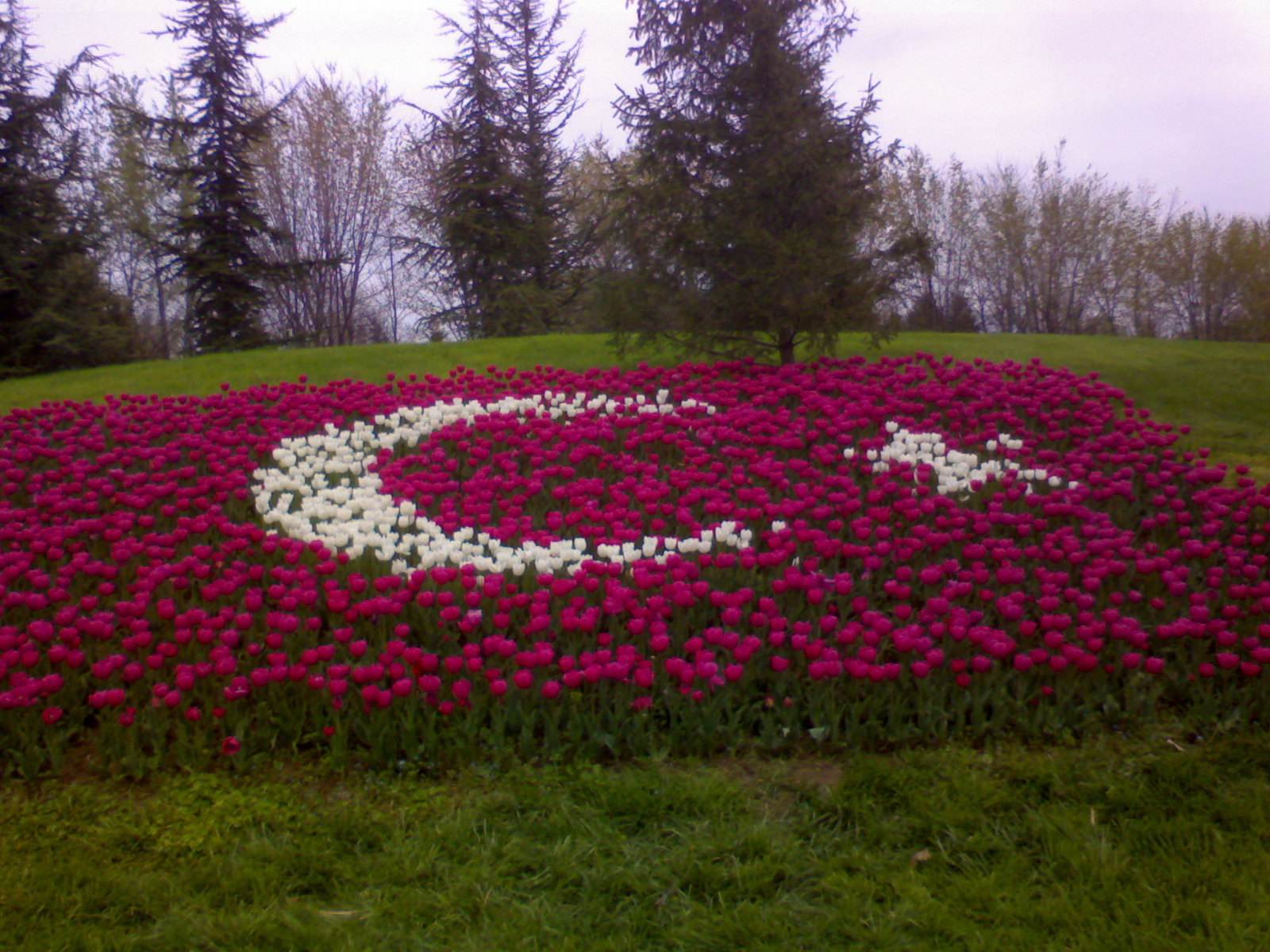 Çiçek Ay yıldız - Flower Crescent and Star